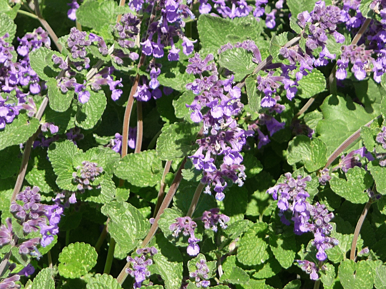 Traubige Katzenminze in Osterhofen